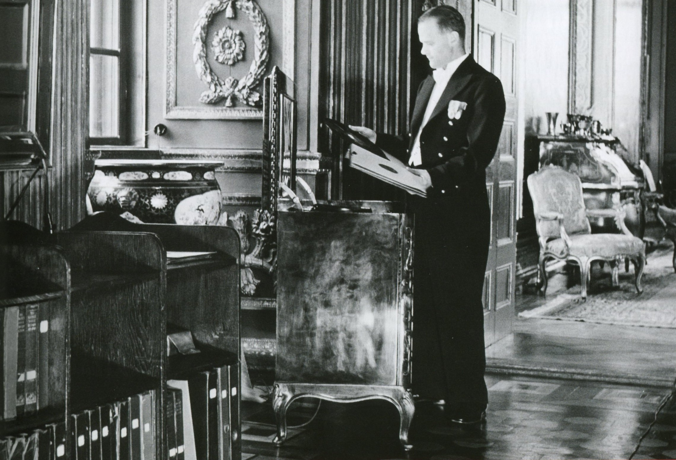 Gustav V:s Centrum Radio på stockholms slott 1932